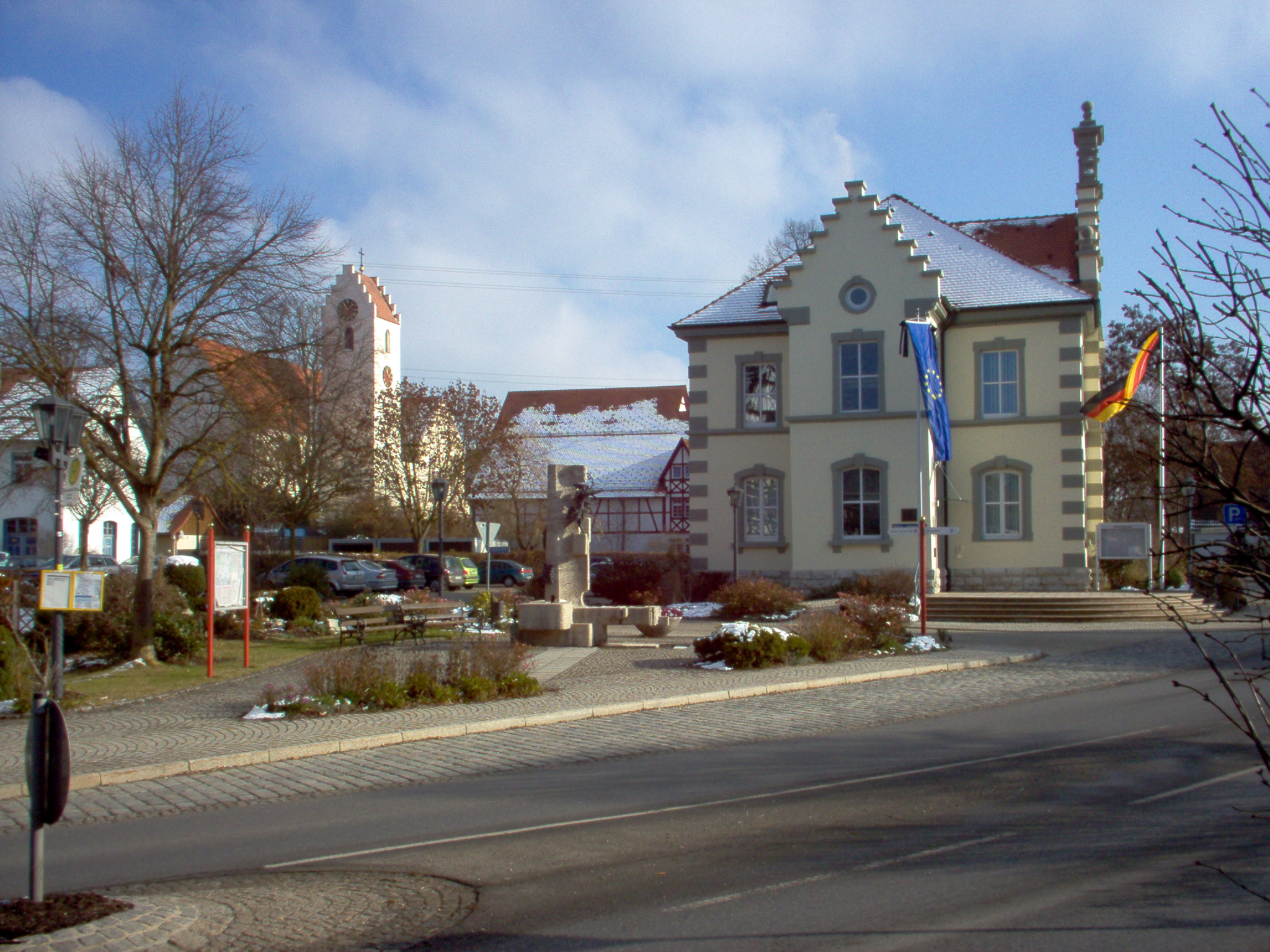 Wilhelm-Lehmann-Platz in Sigmaringendorf (Wilhelm-Lehmann-Place in Sigmaringendorf, Germany)